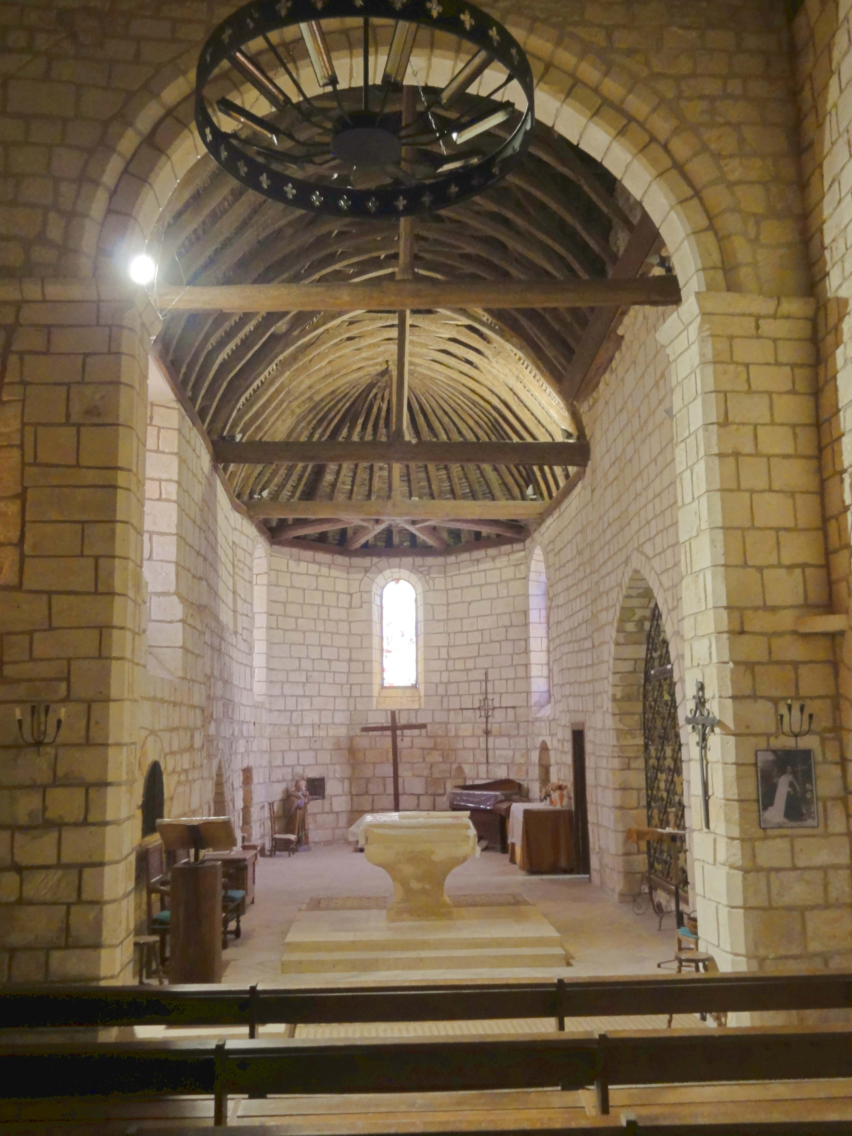 Intérieur de l'église - voir titre.